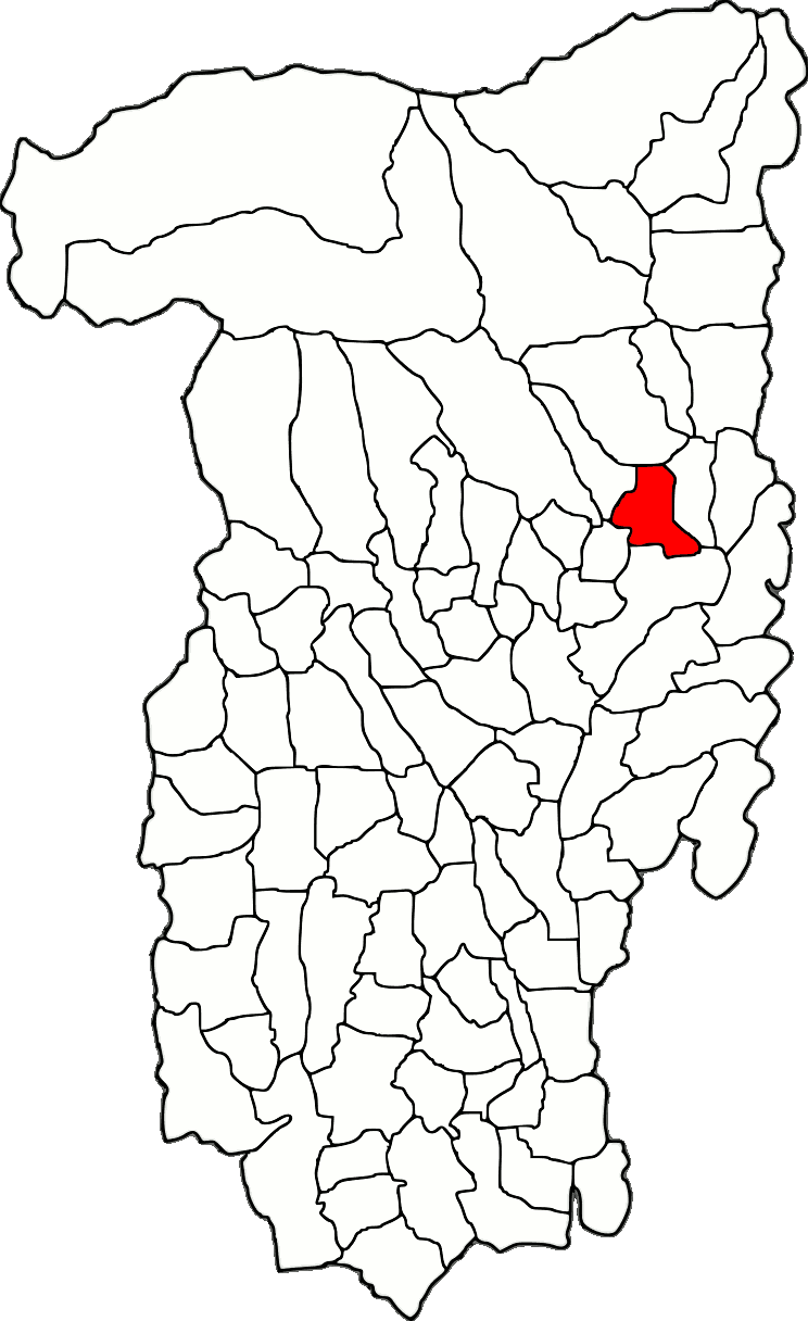 Lage der Gemeinde Bujoreni im Kreis Vâlcea (RO).